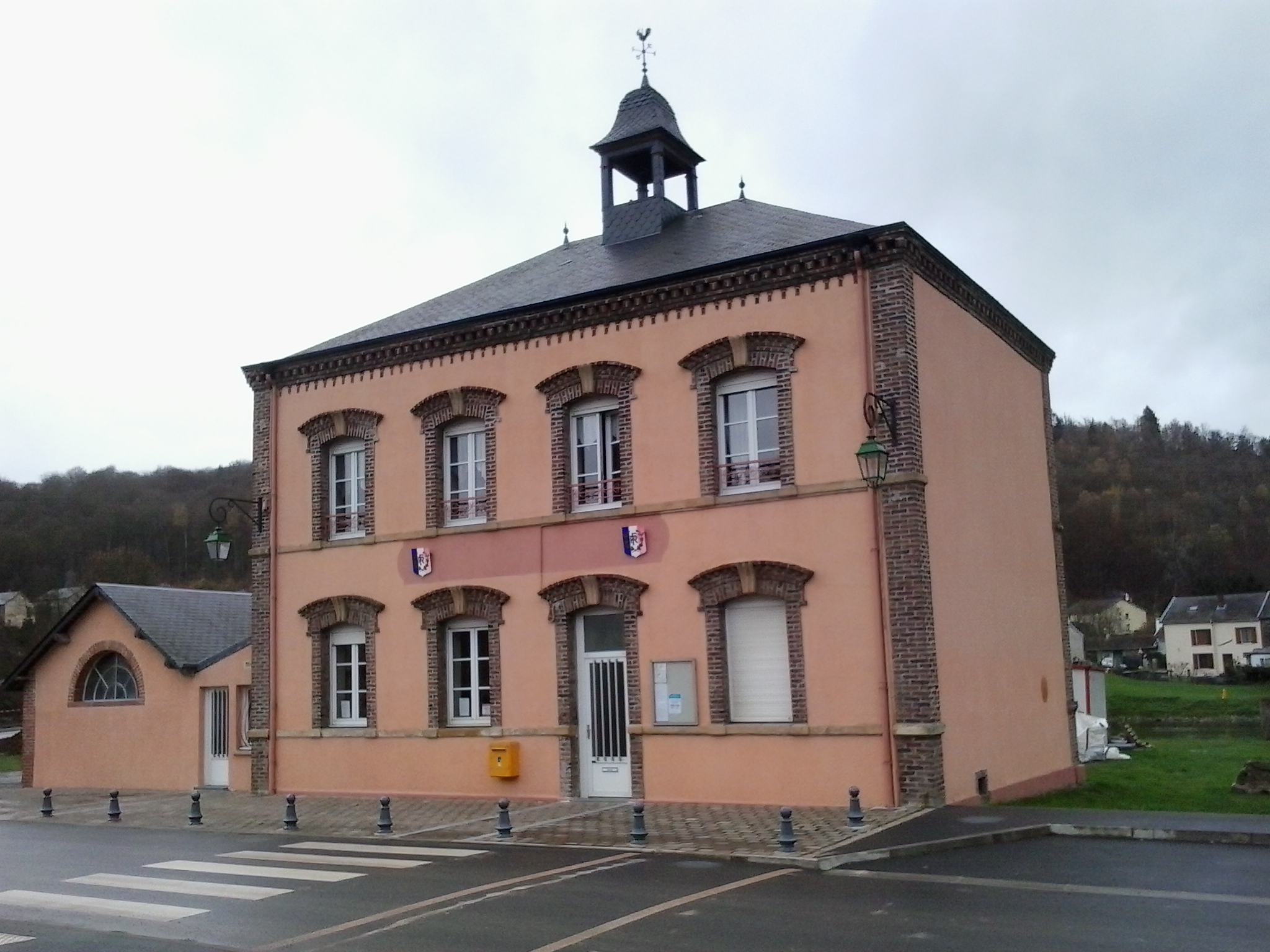 Mairie de Tournavaux, département des Ardennes, France